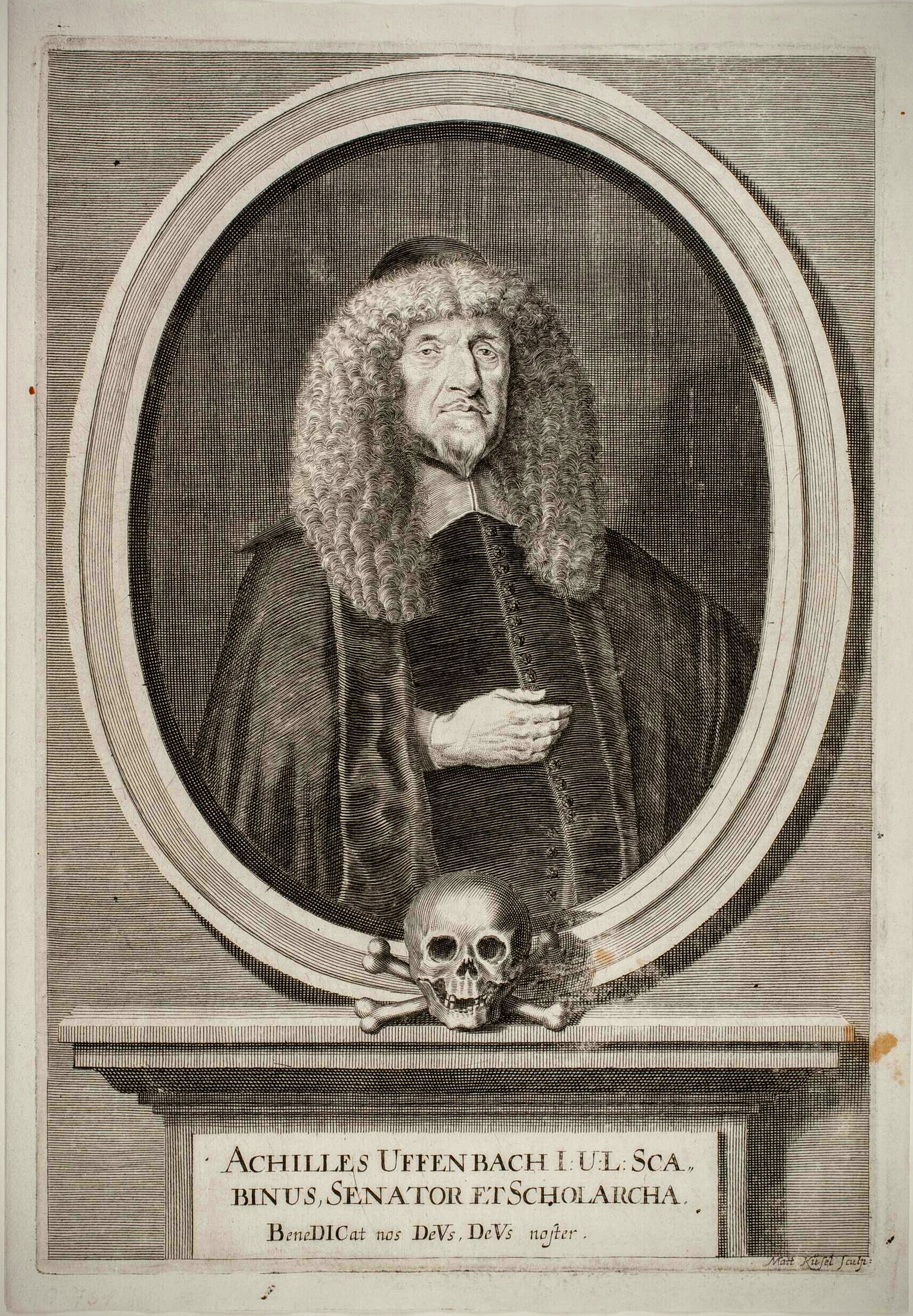 Achilles Uffenbach (1611–1677), Patrizier der Reichsstadt Frankfurt am Main